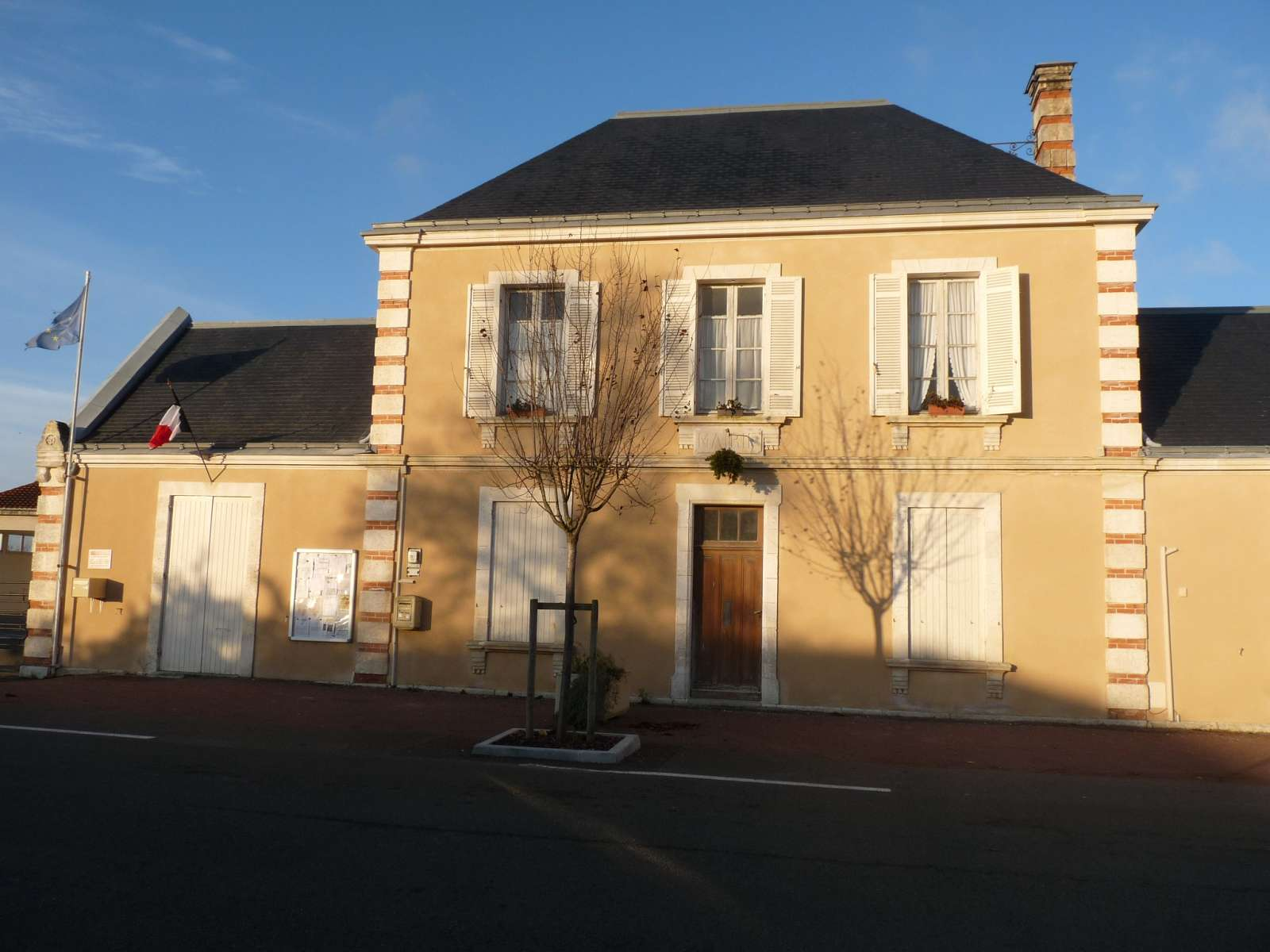 mairie de Pouillac, Charente-Maritime, France